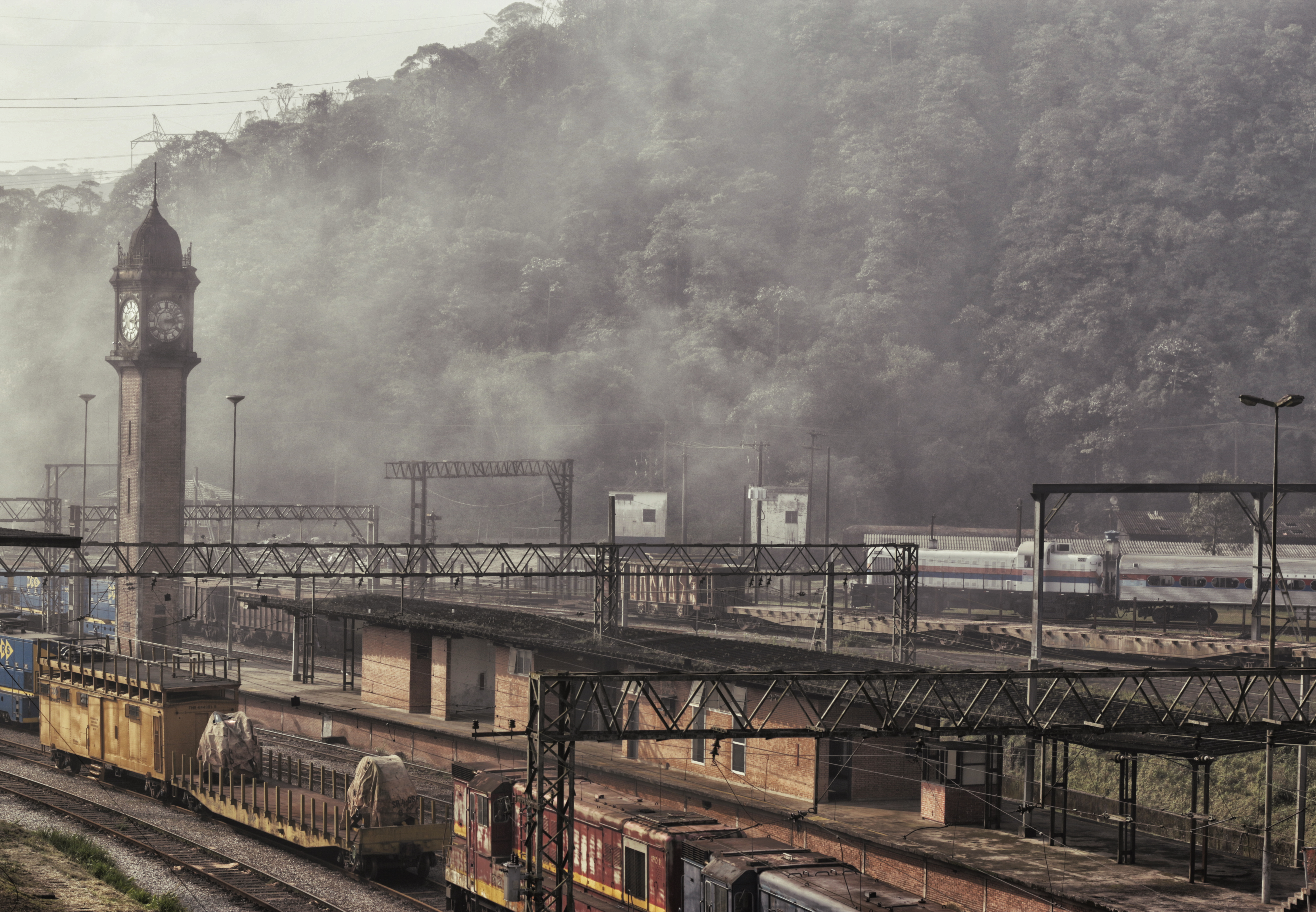 Estação ferroviaría situada na vila de Paranapiacaba, município de Santo André.